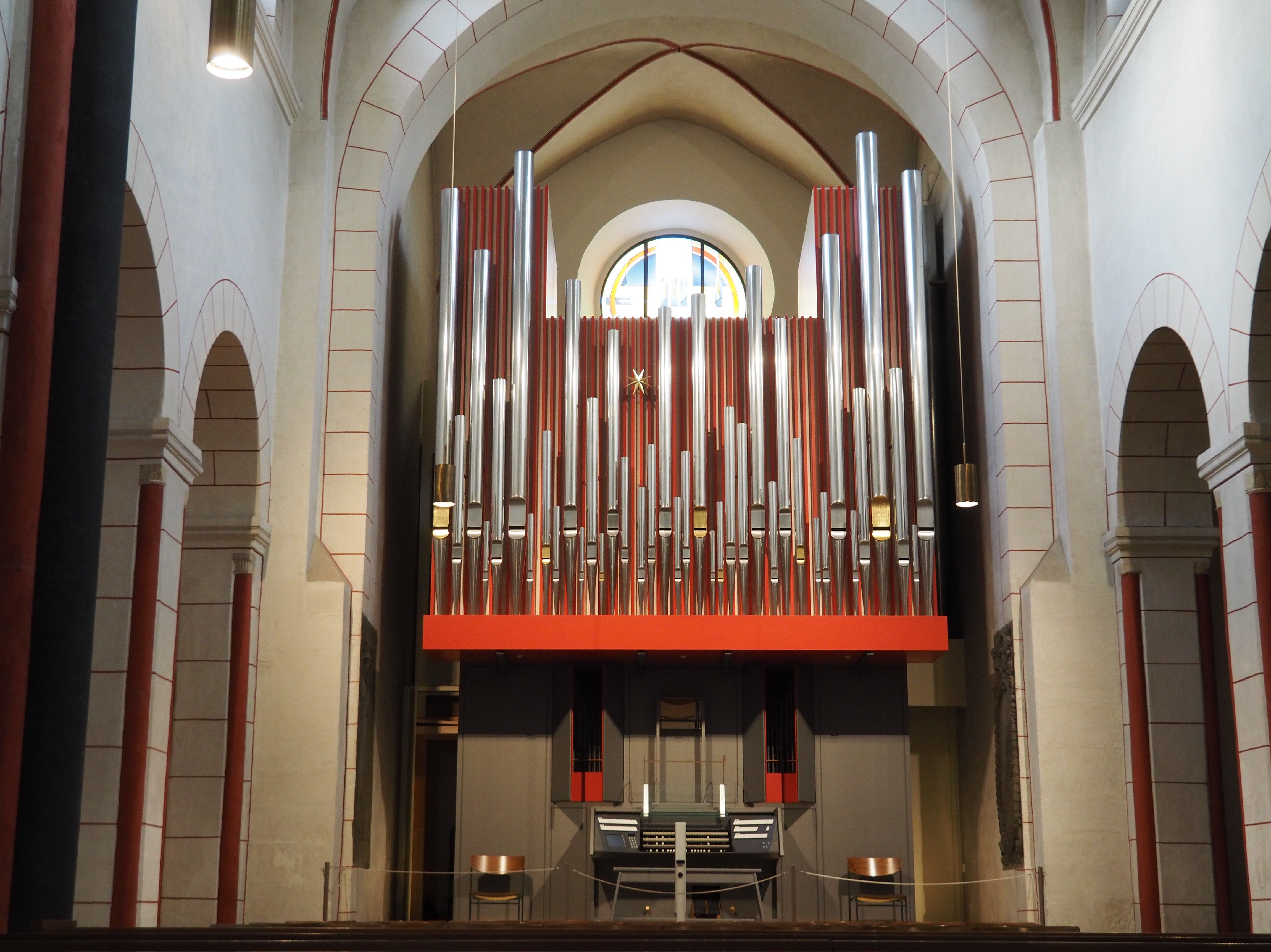 Orgel in der Marktkirche St. Cosmas und Damian (Goslar)